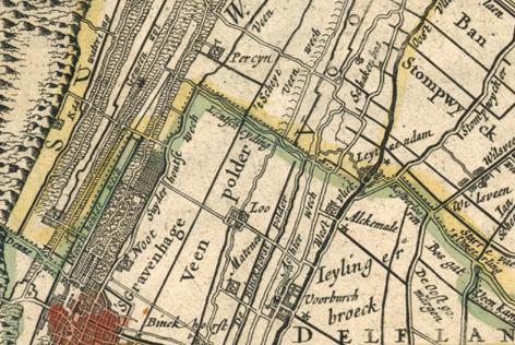 voorburg, Rijnland amstelland atlasmaior